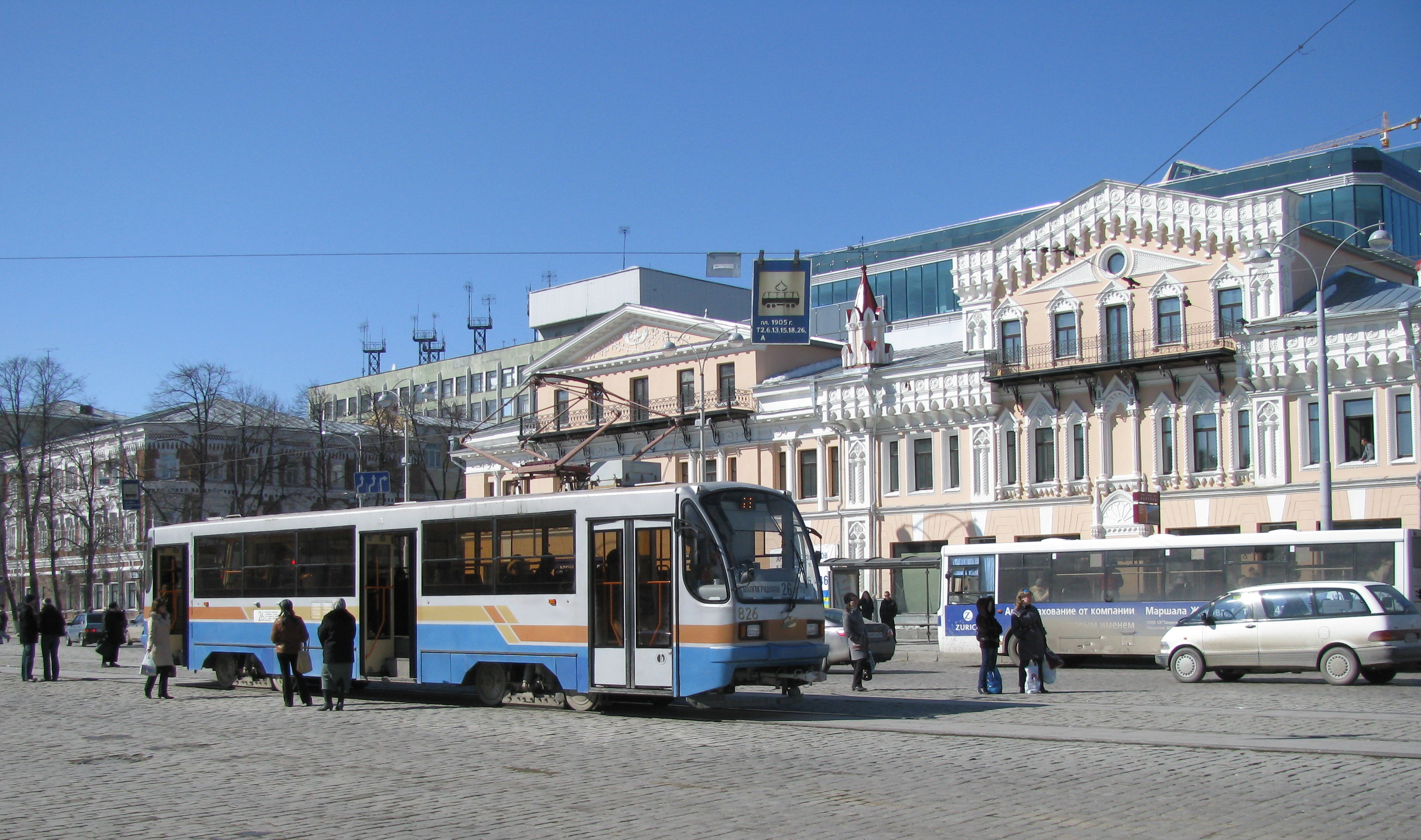 Tramvaj v Jekaterinburgu na náměstí 1905 g.; vůz SPEKTR